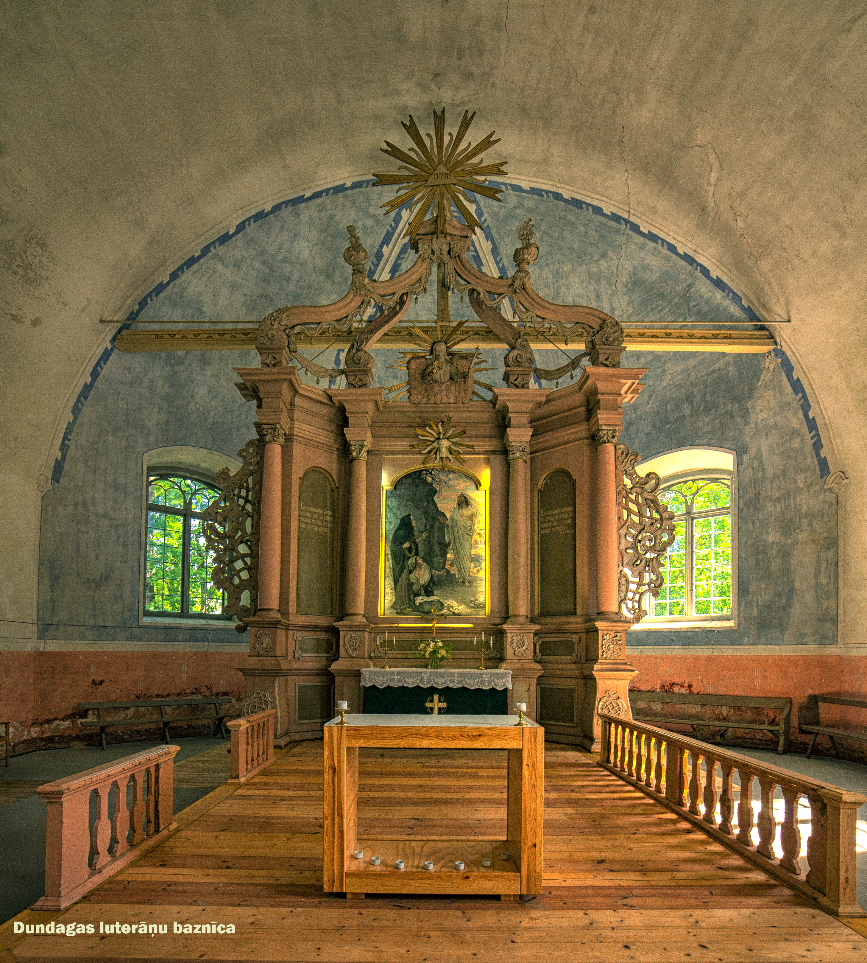 Altārglezna "Lieldienu rīts", Dundaga, Pils iela 6a